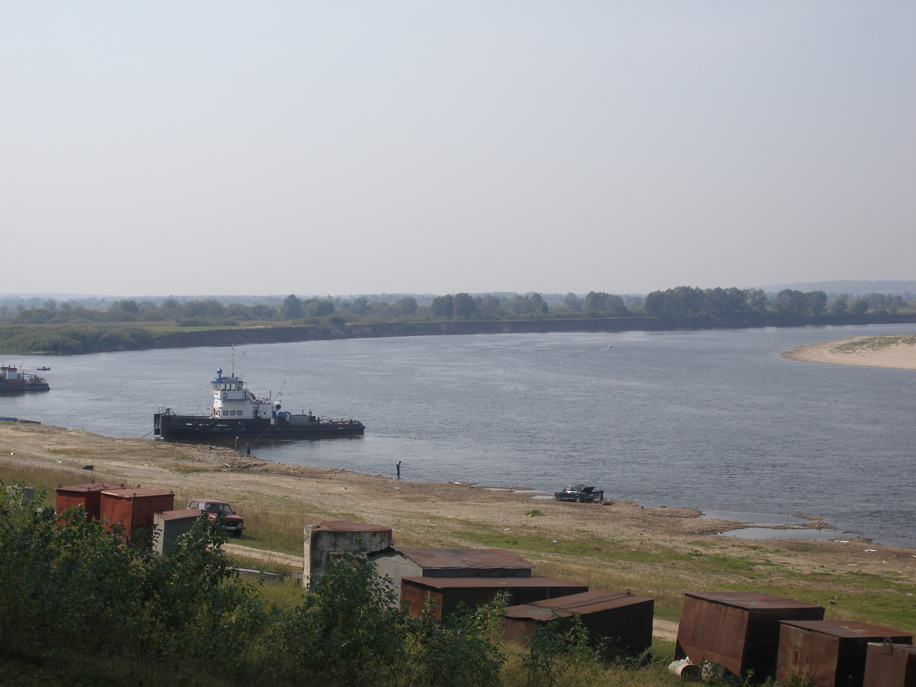 Шиморское, Нижегородская Область